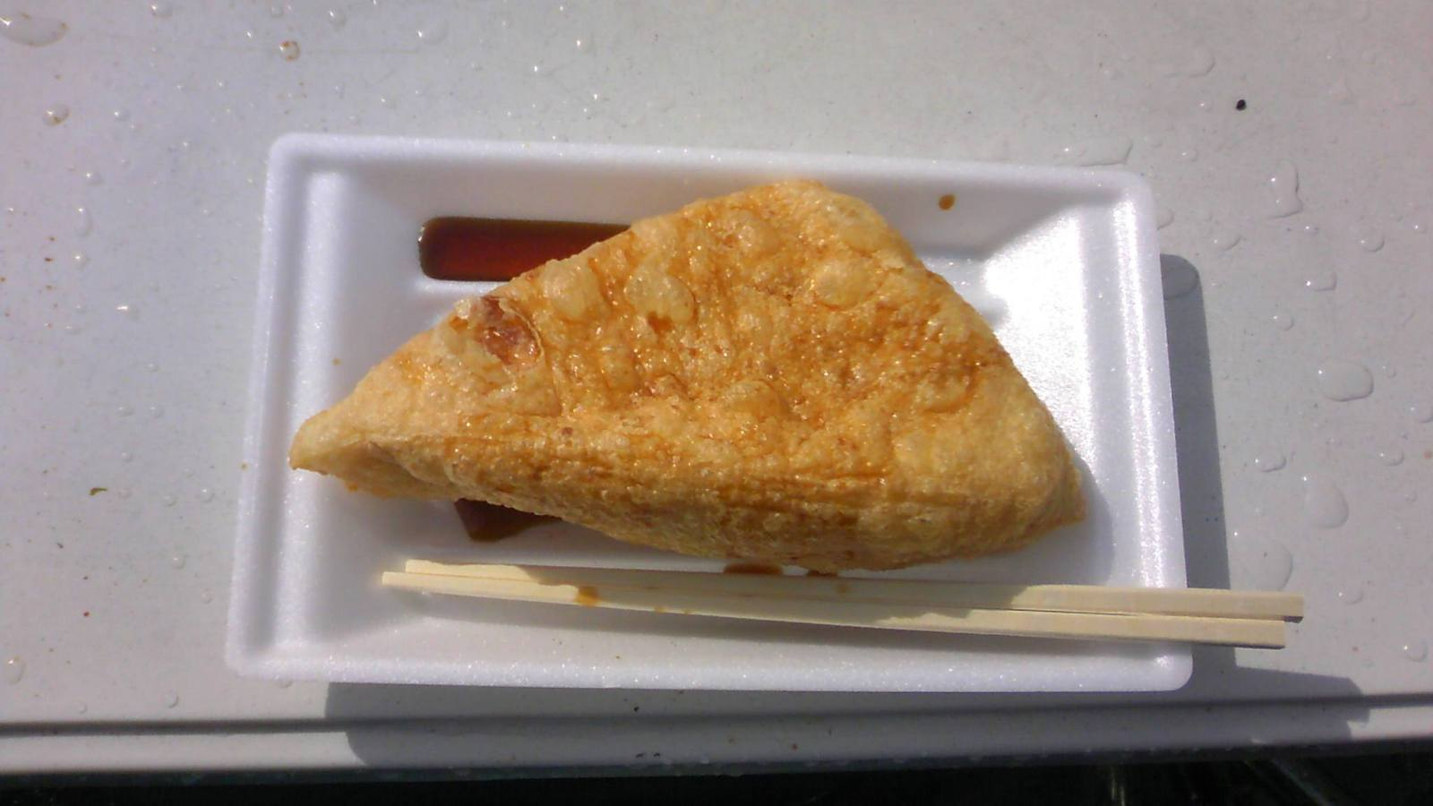 定義山名物「三角油揚げ」